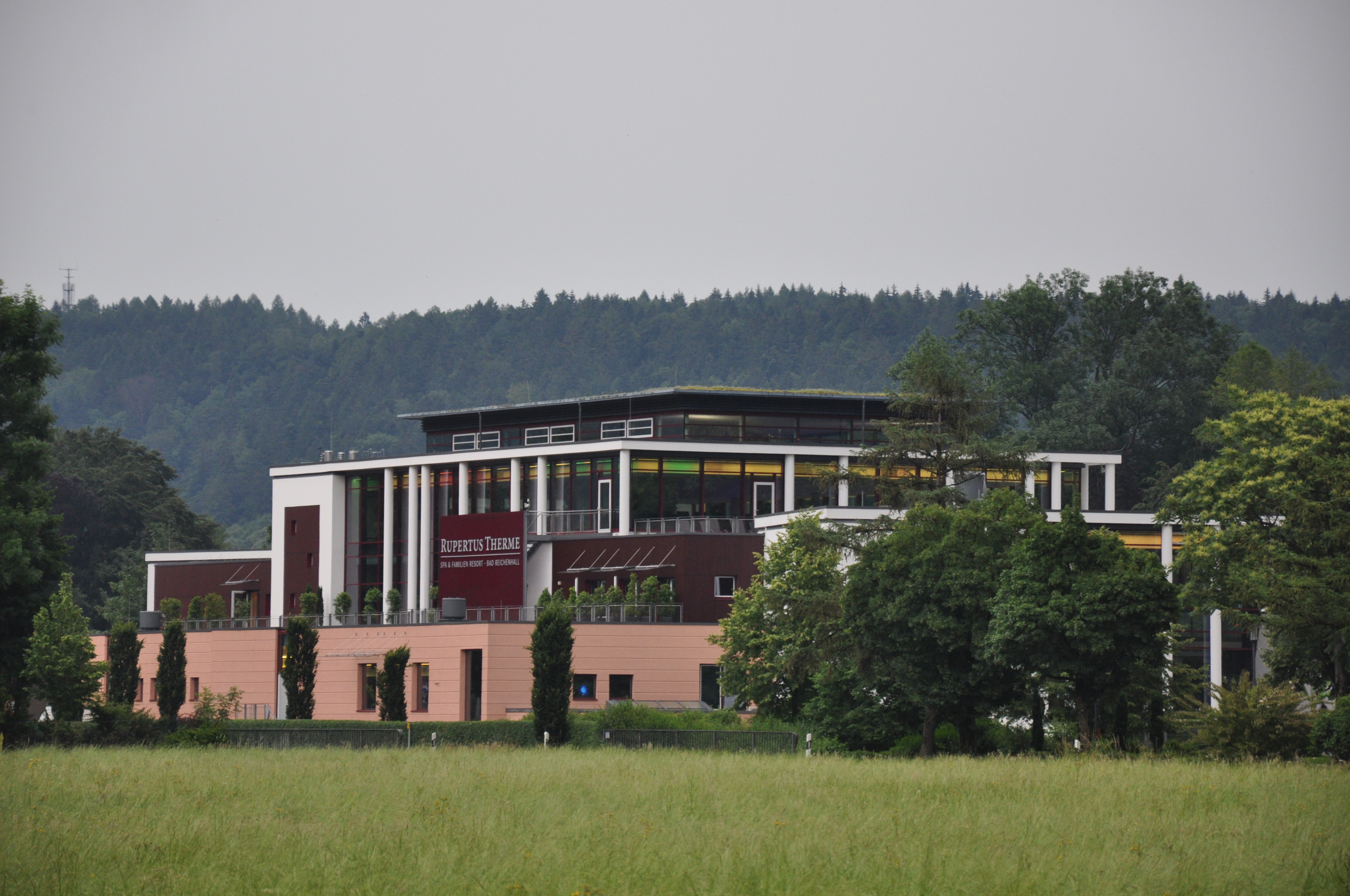 Therme und Familienbad Rupertustherme in Bad Reichenhall.